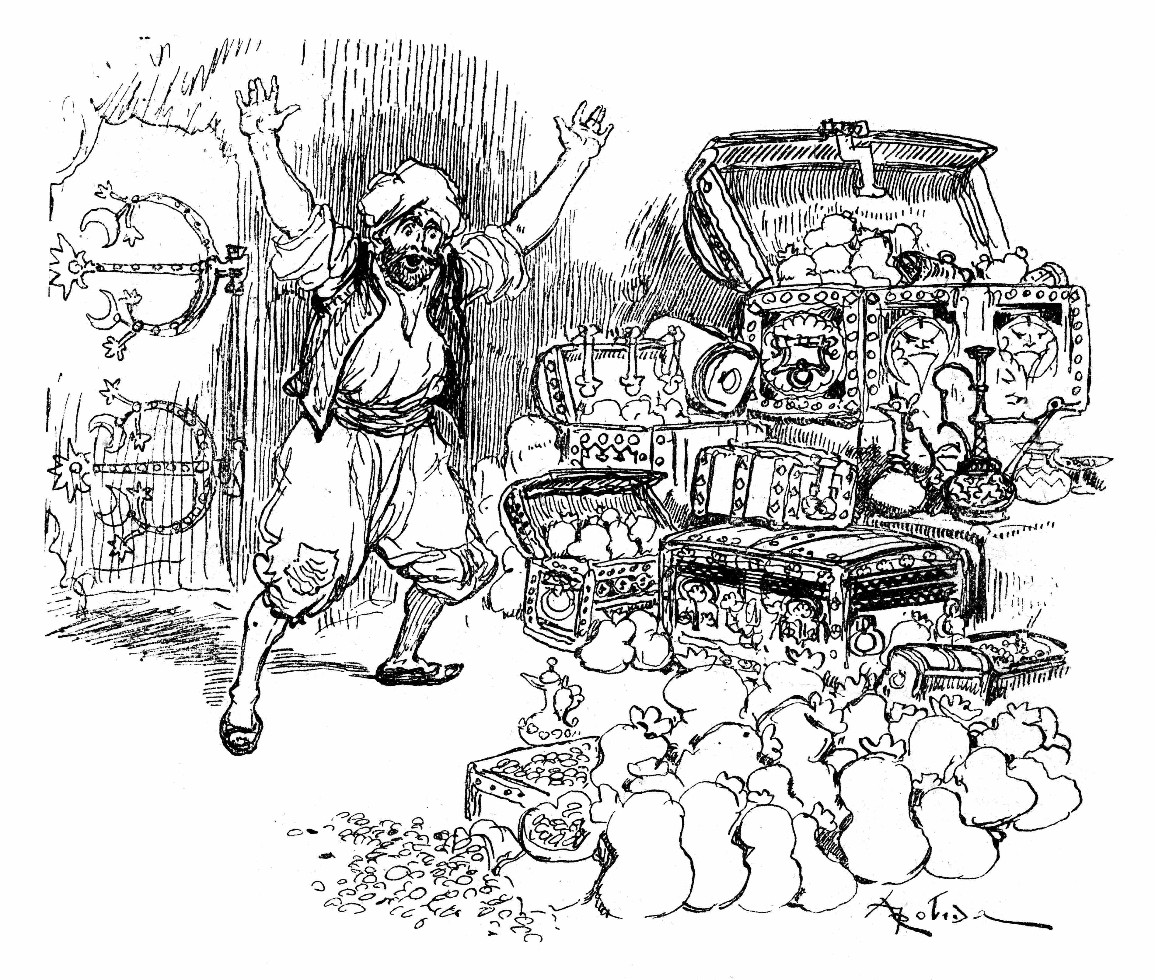 Illustration par Albert Robida du livre Ali-Baba et les quarante voleurs